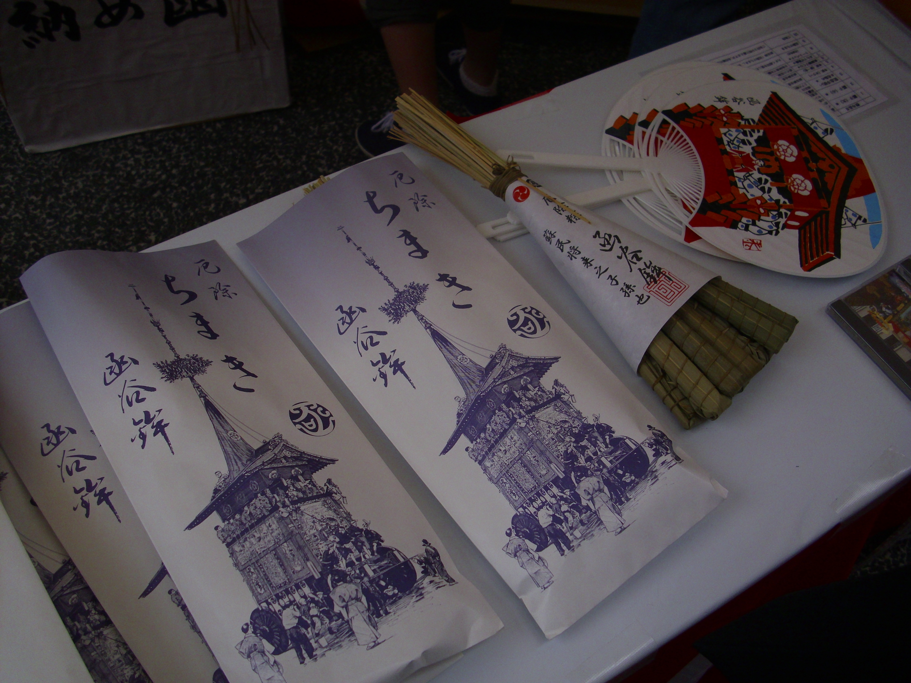 祇園祭で販売される粽（函谷鉾）、材料となる笹は右京区・左京区の京都丹波高原国定公園指定地域で採取される